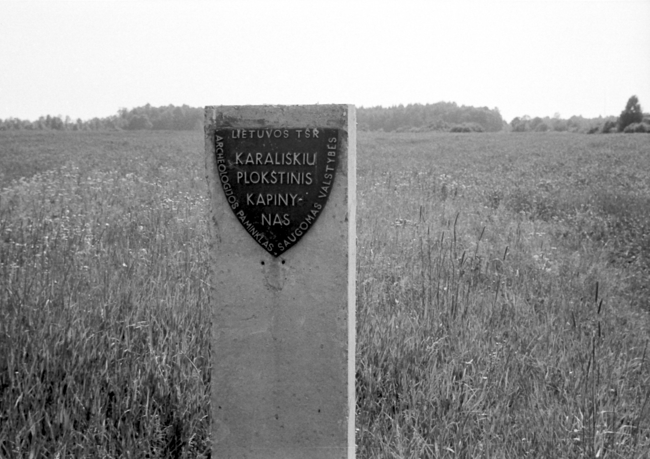 Karališkių kapinynas, Biržų rajonas